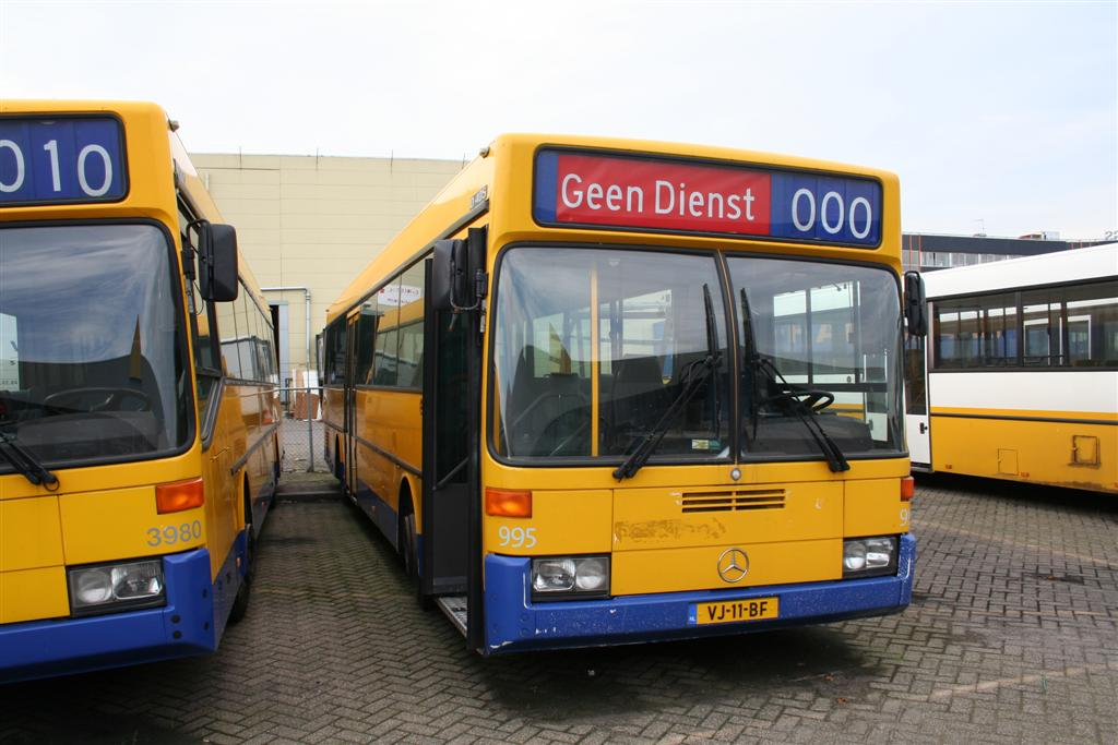 Huisstijl van een voormalige Zuid-West-Nederland-bus op het remiseterrein van Connexxion in Spijkenisse.